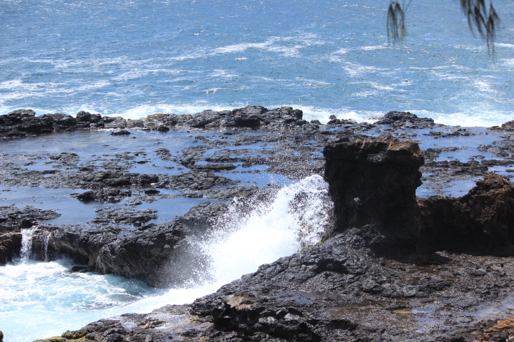 Botanical Gardens Kauai, Hawaii